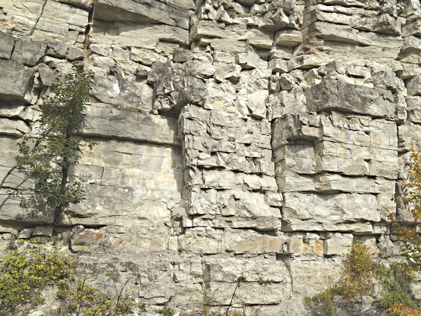 Dieser Kalkstein ist ein reiner, weißer Schichtkalkstein, der im Malm Beta des Weißen Jura vor etwa 155 Millionen Jahren abgelagert wurde.